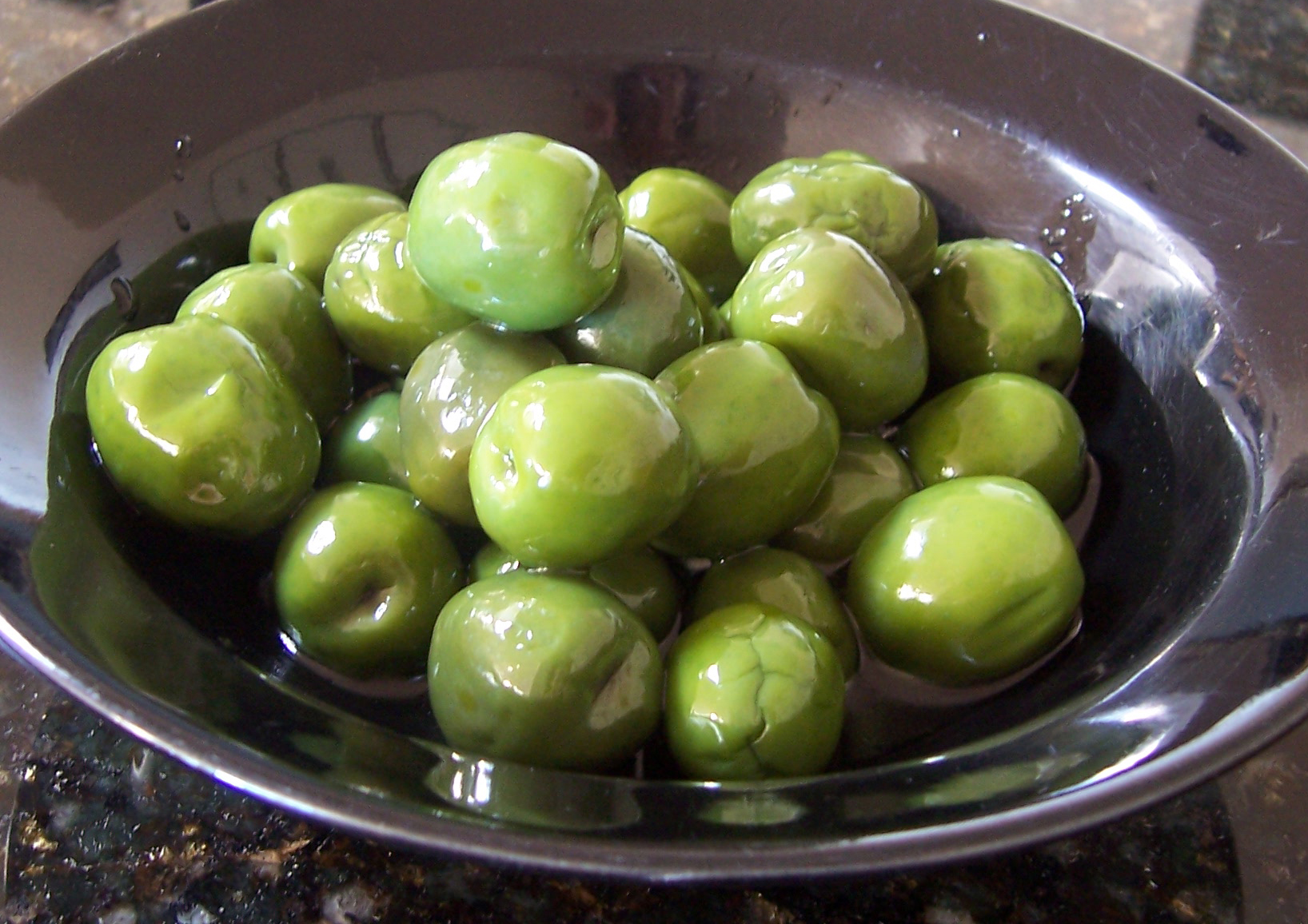 Olive siciliane di Castel Vetrano (Trapani)